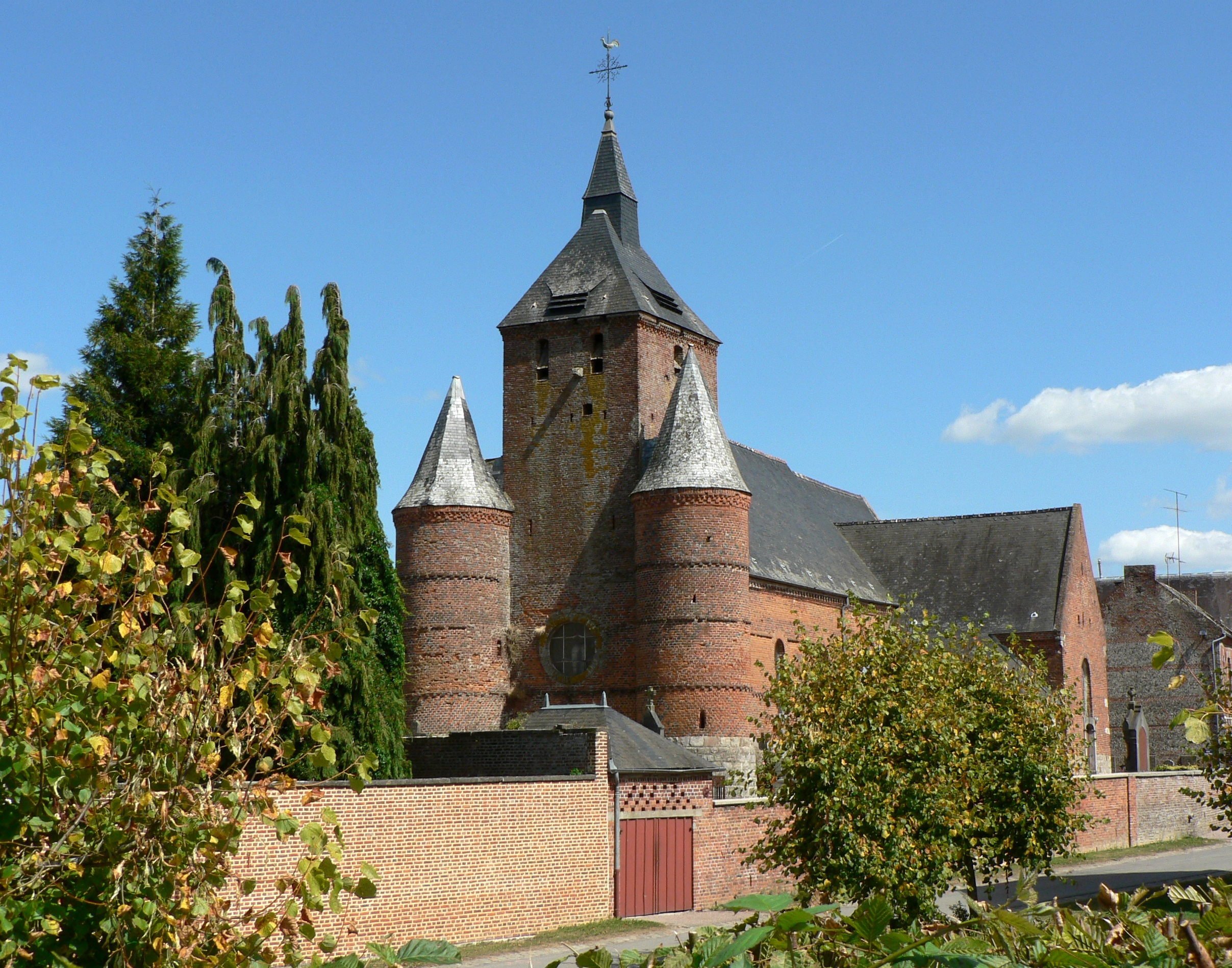 Église fortifiée de Autreppes, Aisne, France